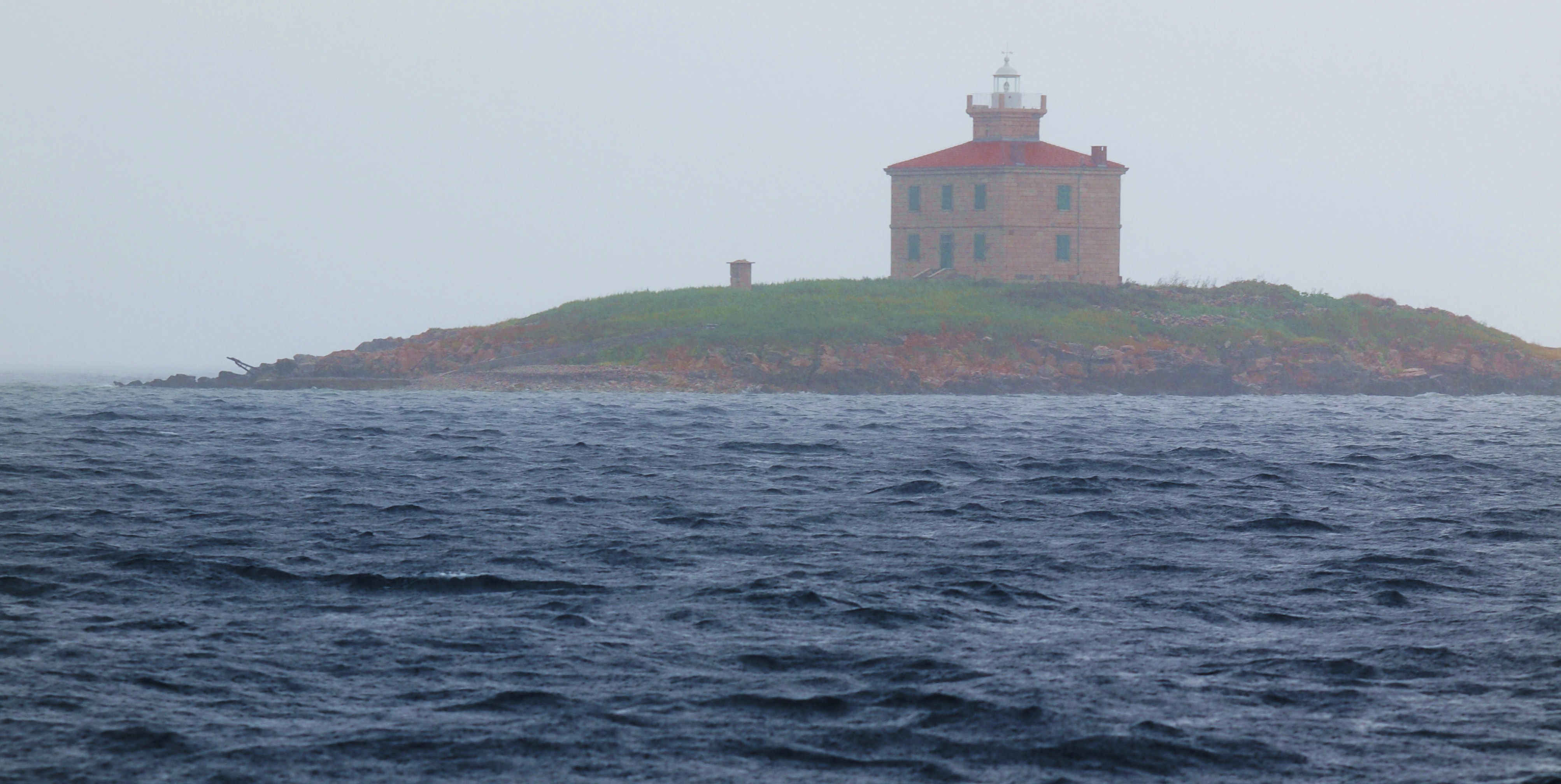 Leuchtturm Zaglav auf einer Felsenisnsel ca 1,2 km westlich etwa der Mitte der Insel Cres, Kroatien, erbaut 1876, Standort Object location44° 55′ 16.2″ N, 14° 17′ 18.38″ E Kennung: Fl(3)W 15s 20m 10sm